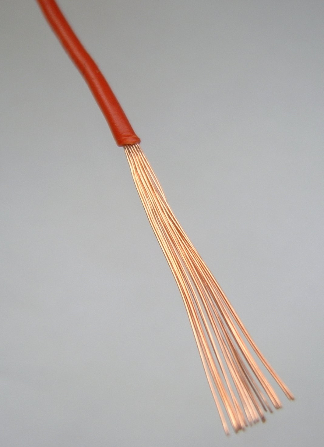 Ein abisoliertes Leitungsstück (Kupferlitze)